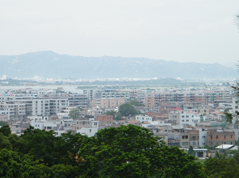 青云岩山腰西瞰城区和远处河浦掠鸟尾山